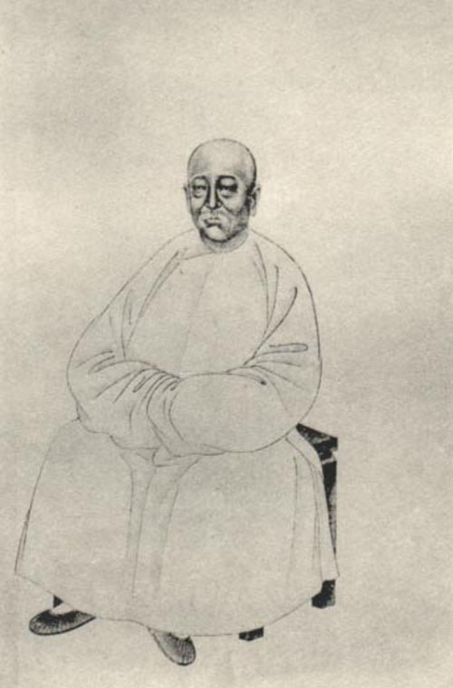 叶衍兰（1823年－1898年），字南雪，号兰台，广东番禺人，清朝官员、文学家、书法家。